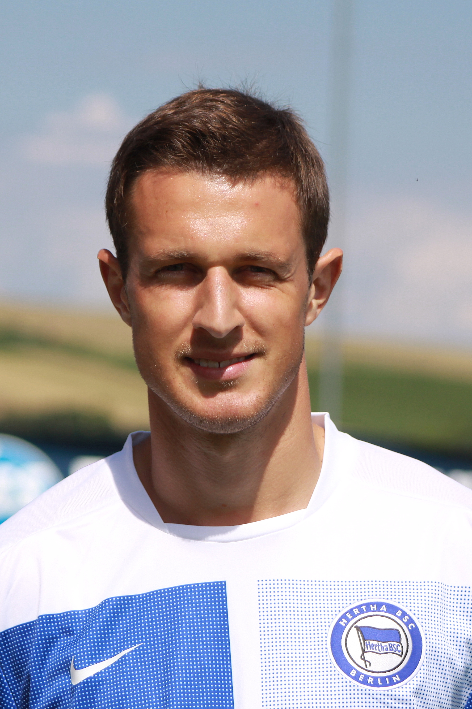 Christoph Janker – Hertha BSC Berlin (1)